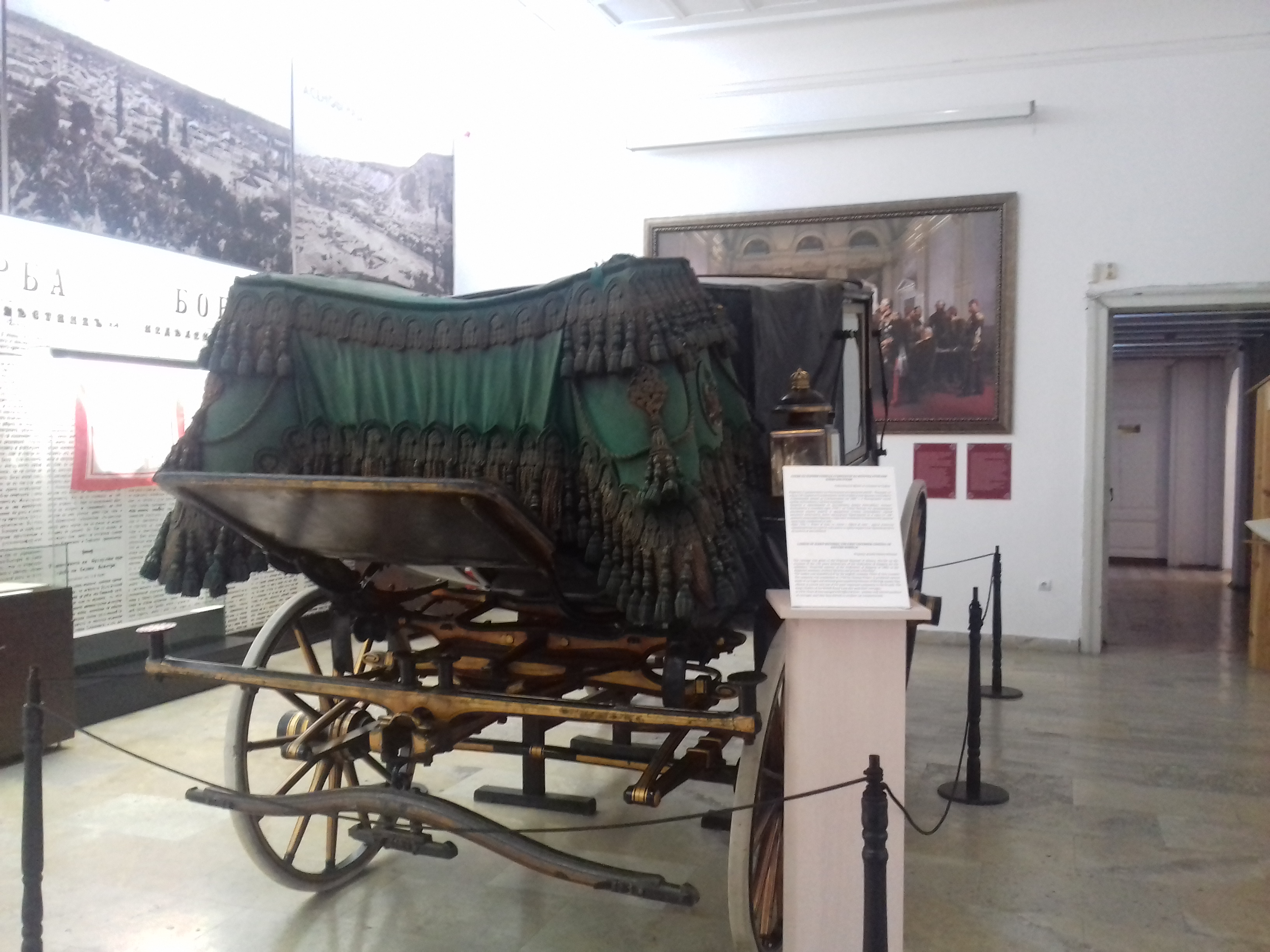 Каретата на Алеко Богориди в експозицията „Съединение на България“ в Историческия музей в Пловдив.